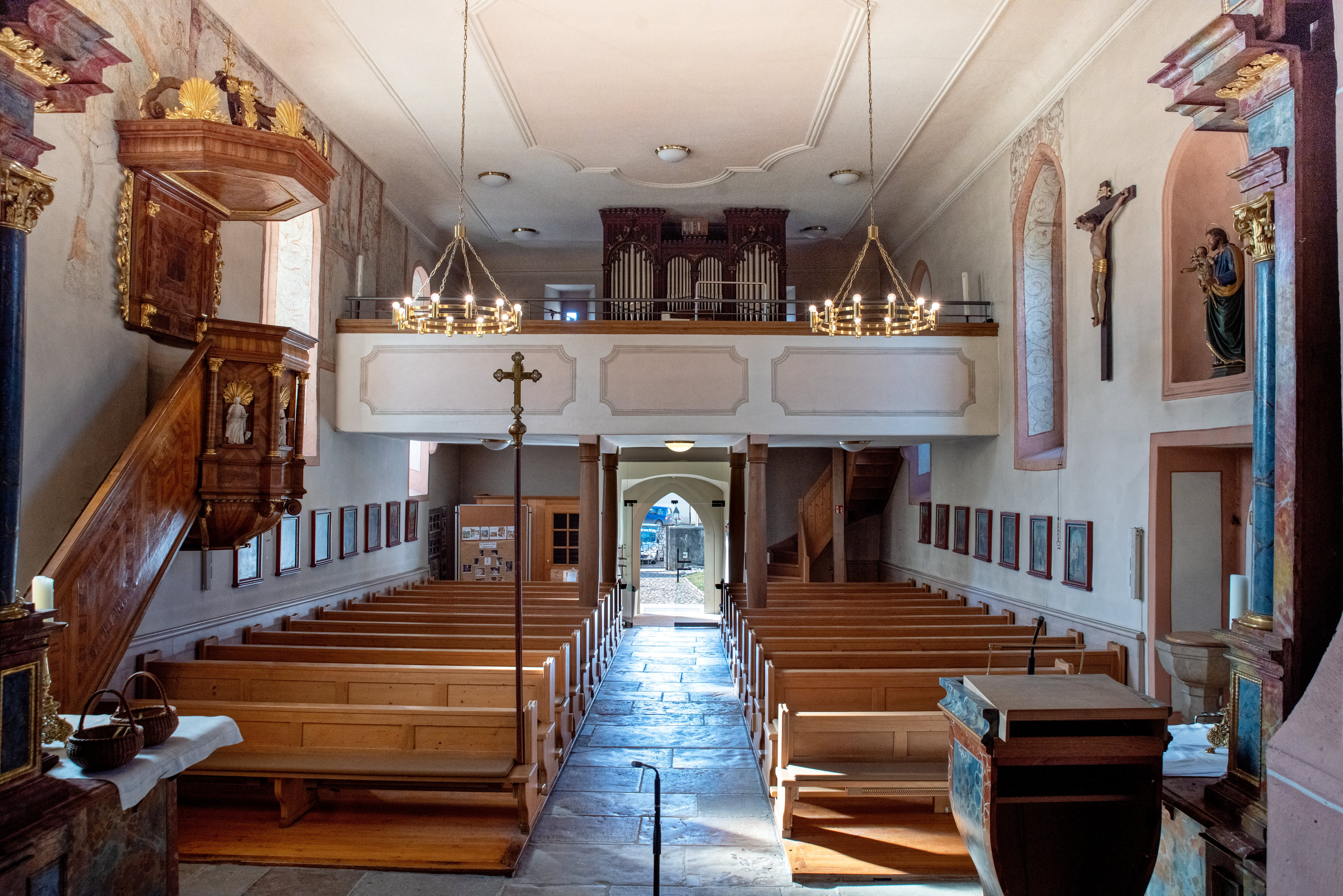 Innenaufnahmen der Kirche